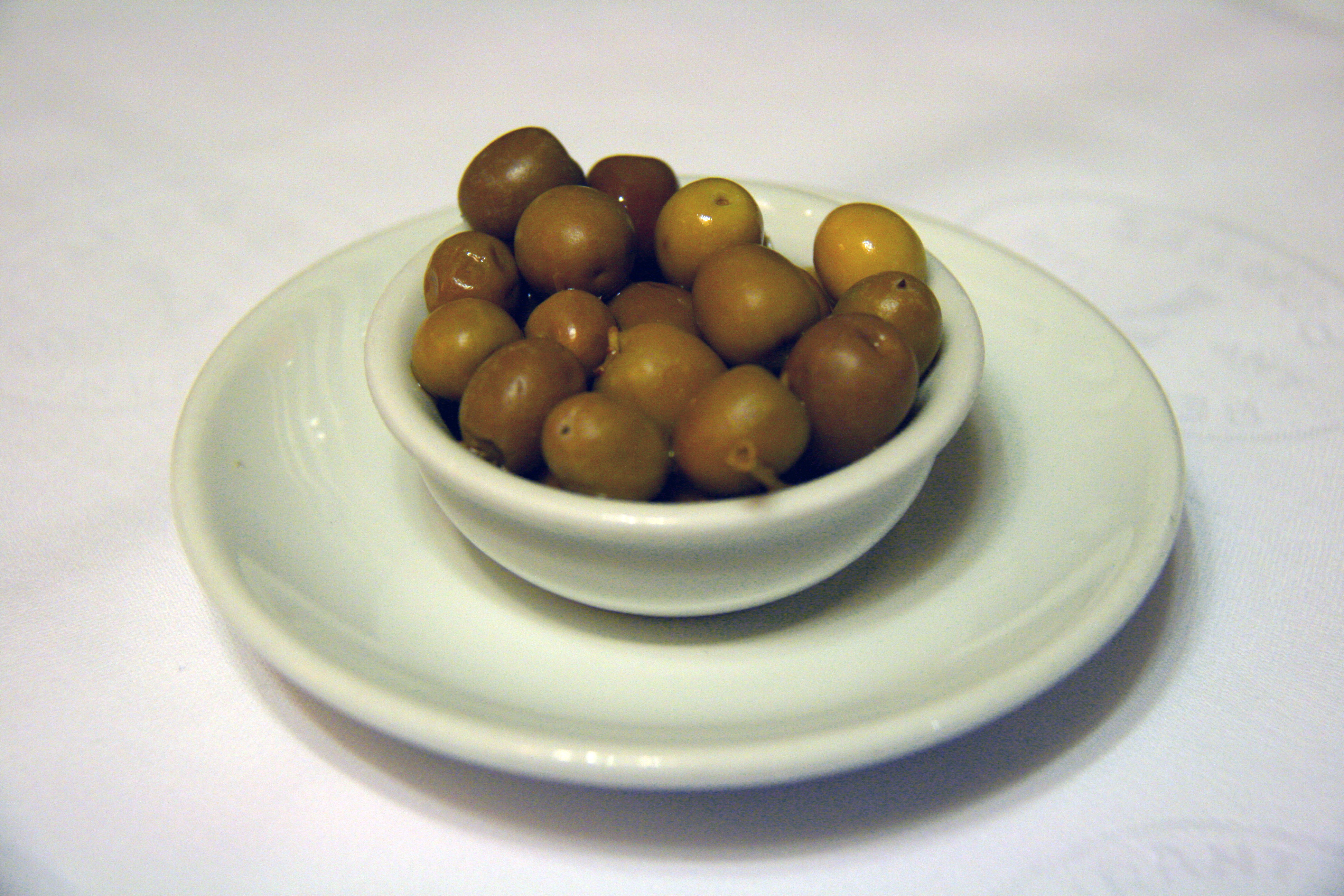 Ración de arbequinas